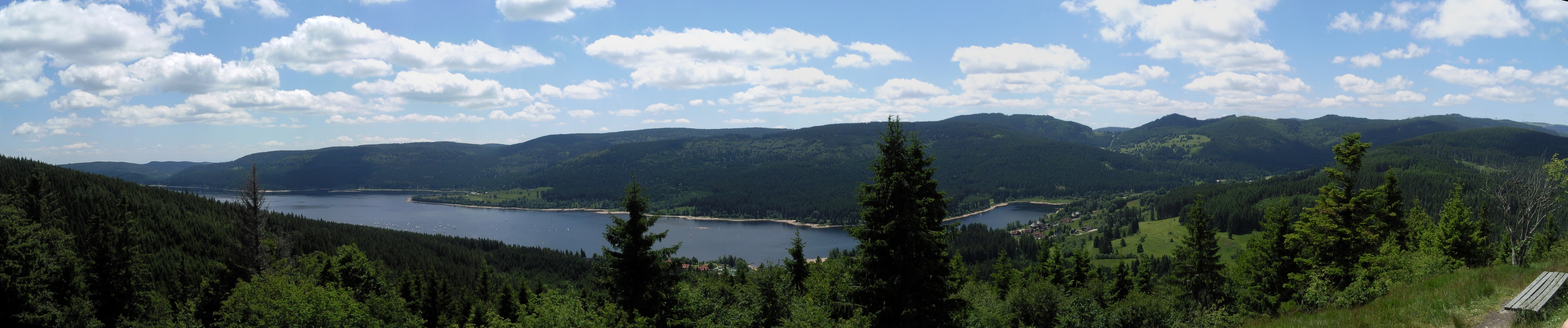 Bildstein Panorama